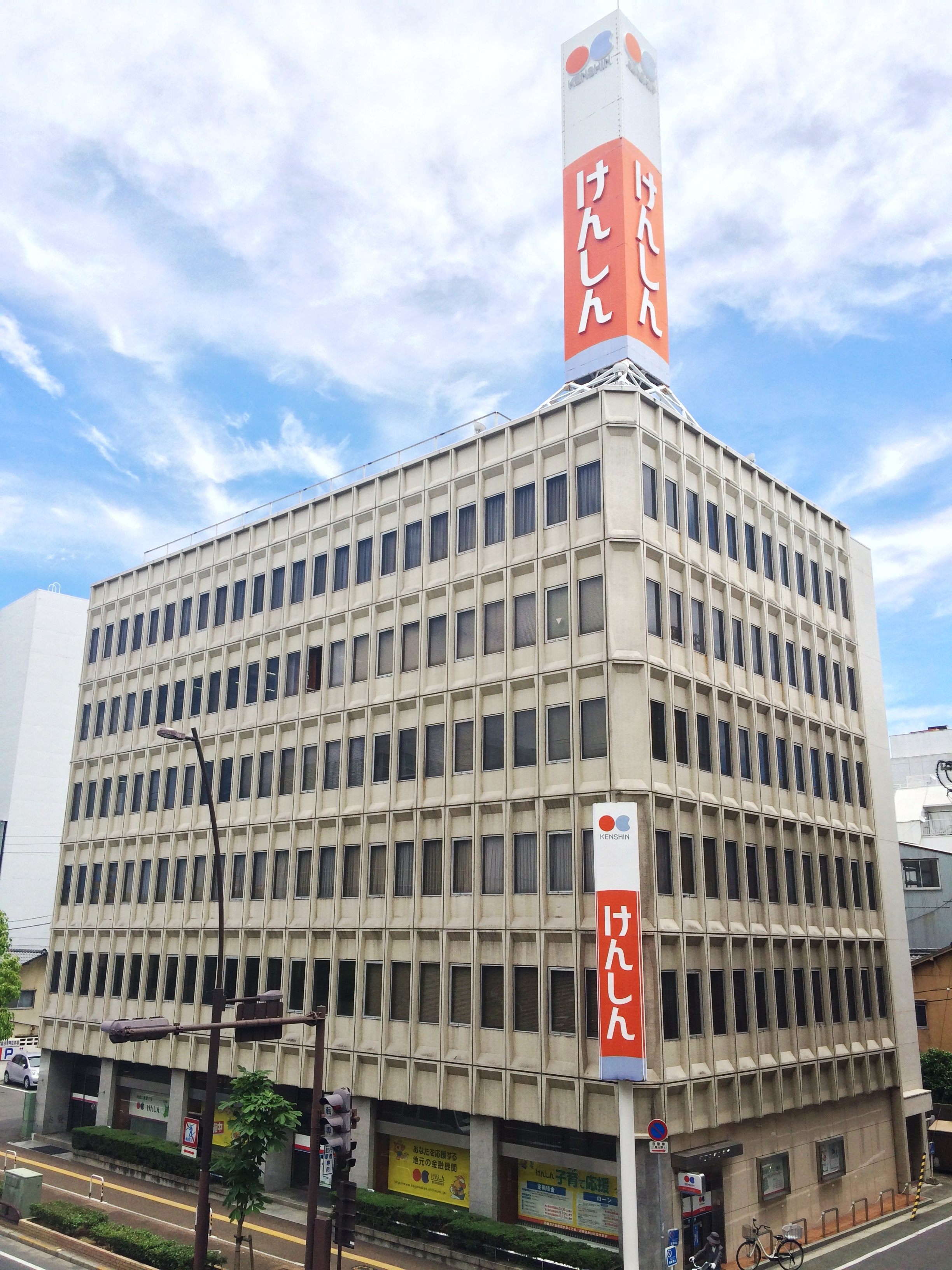 香川県高松市亀井町9番地10にある香川県信用組合本店。